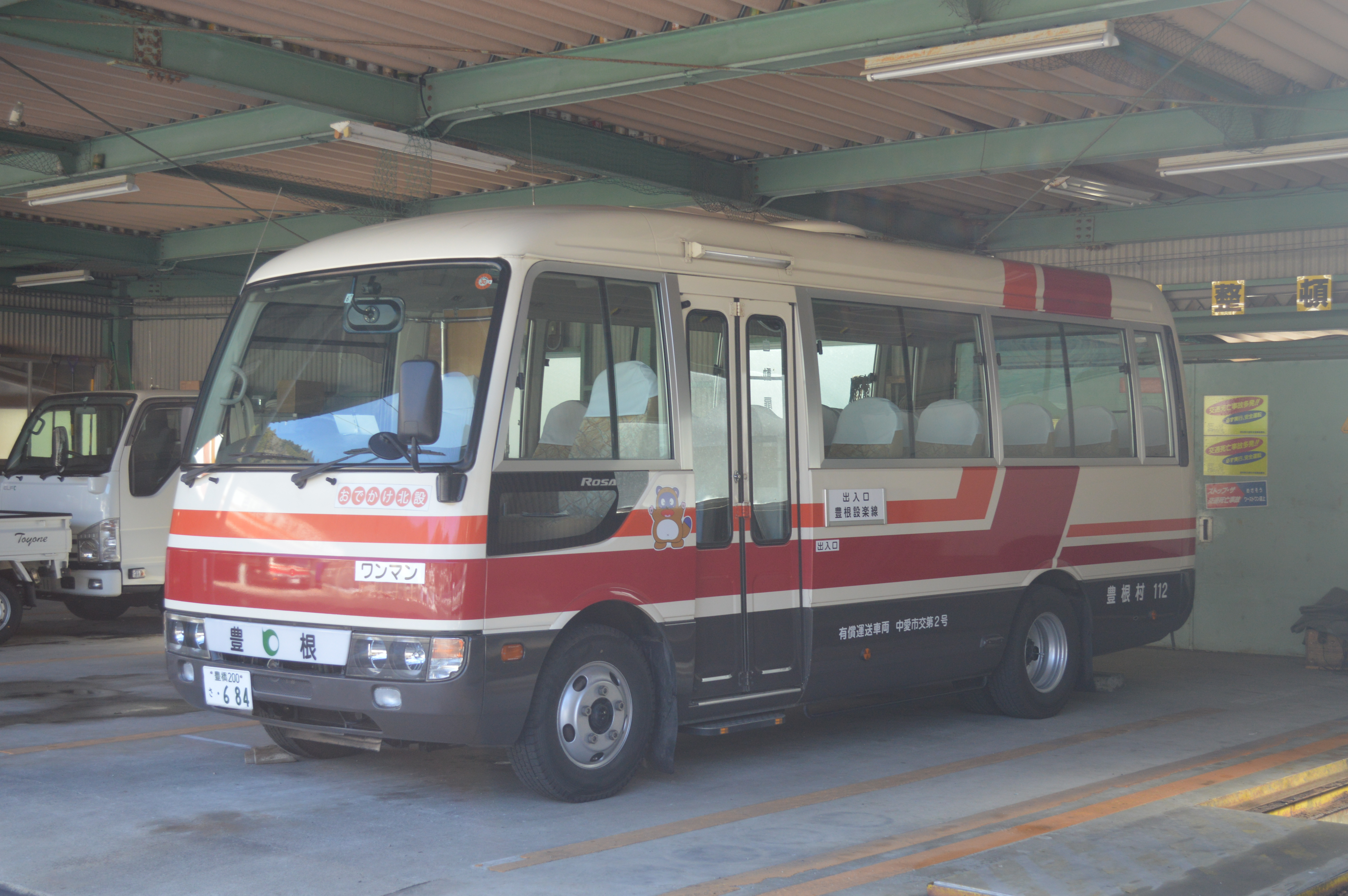 おでかけ北設に用いられているバス。豊根村で撮影。